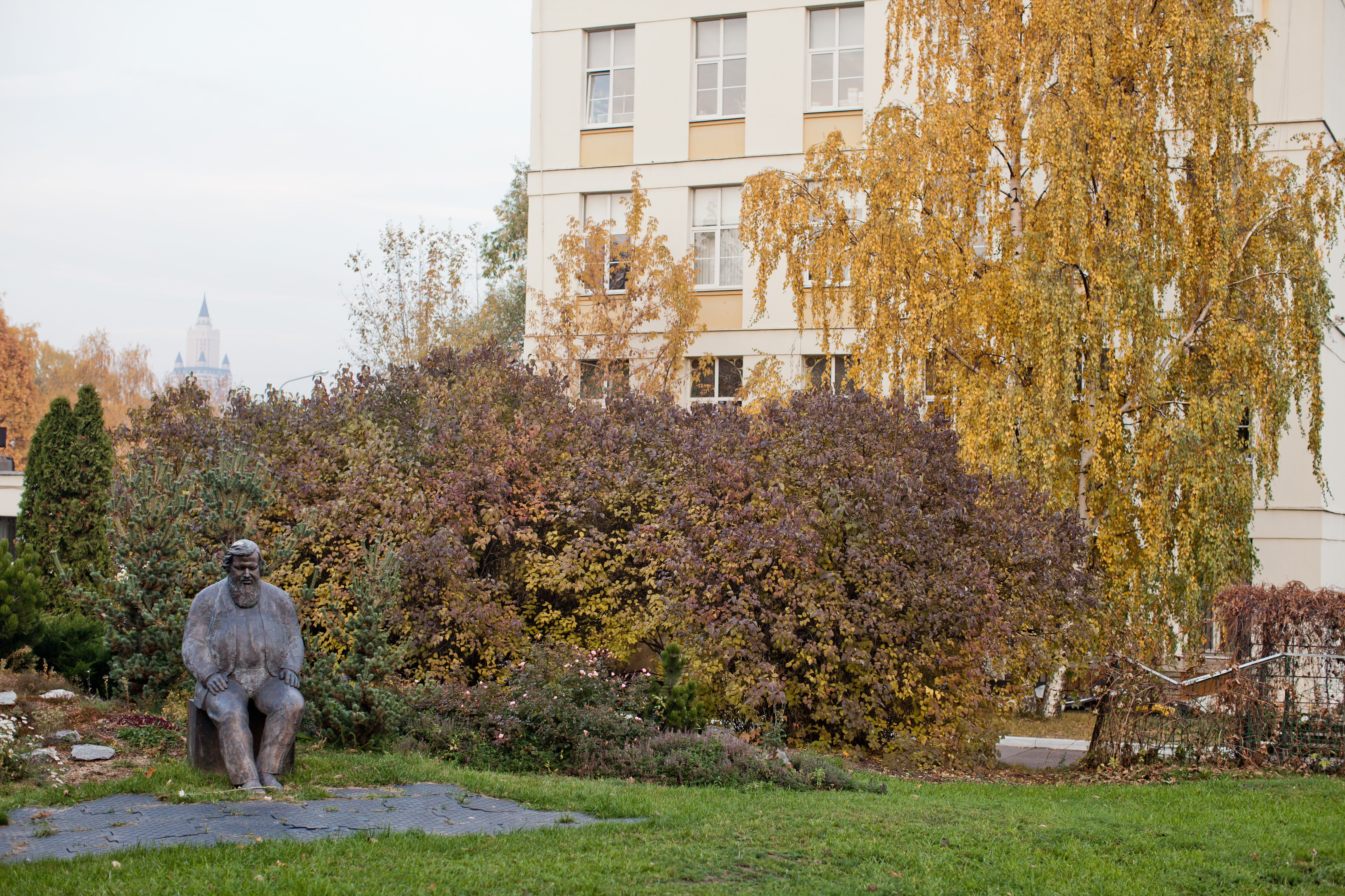 Памятник основателю московской школы-интерната "Интеллектуал" Евгению Маркелову во дворе школы